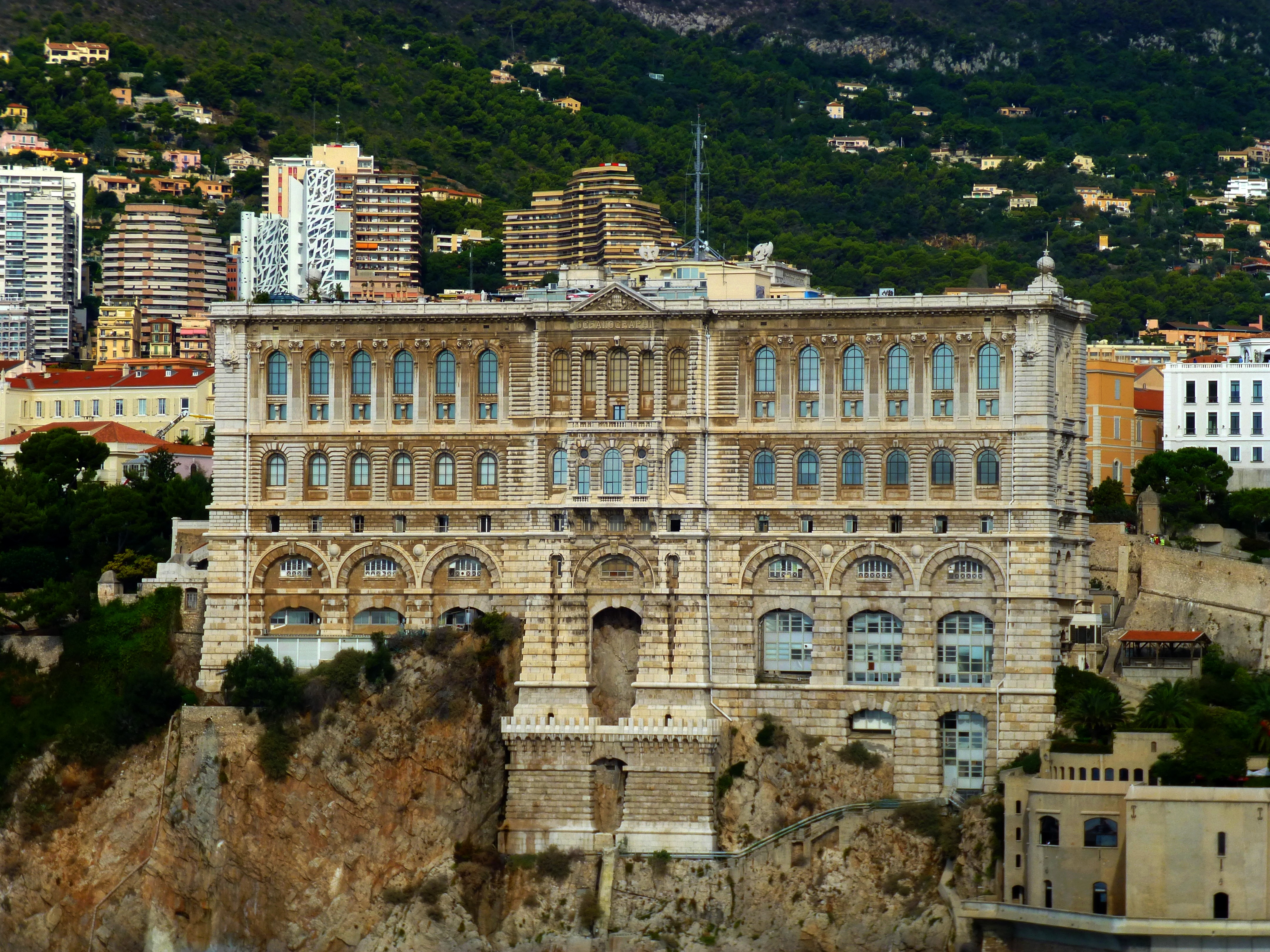 Monaco - Ozeanografisches Museum